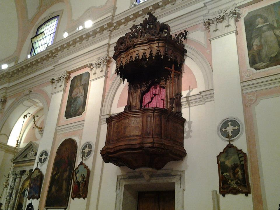 Pulpito della chiesa Arcipretale di Scorzè eseguito dallo scultore e intagliatore Giovanni Zardo detto "Fantolin" nel 1792